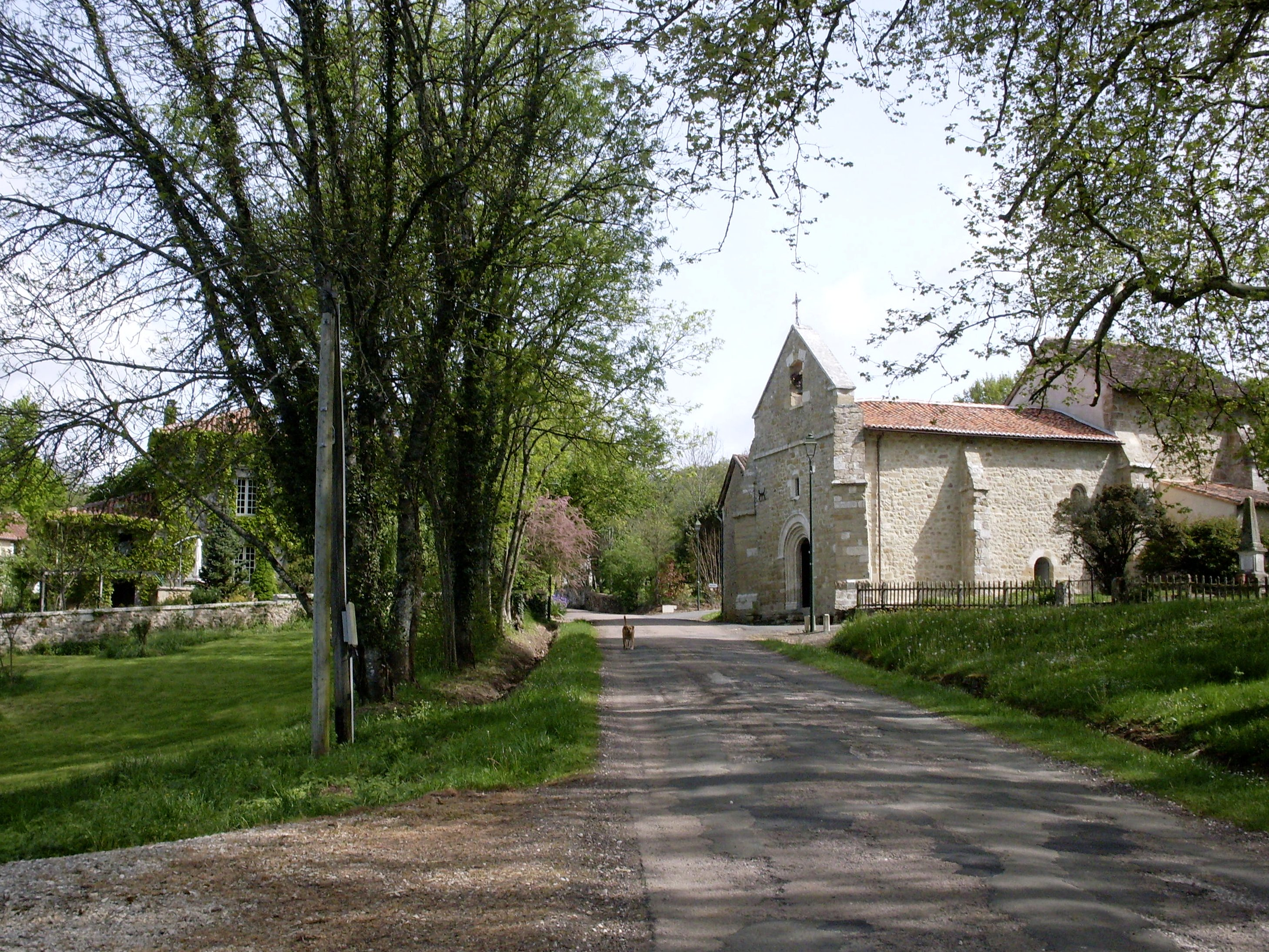 Route principale et l'église de Soudat, Dordogne